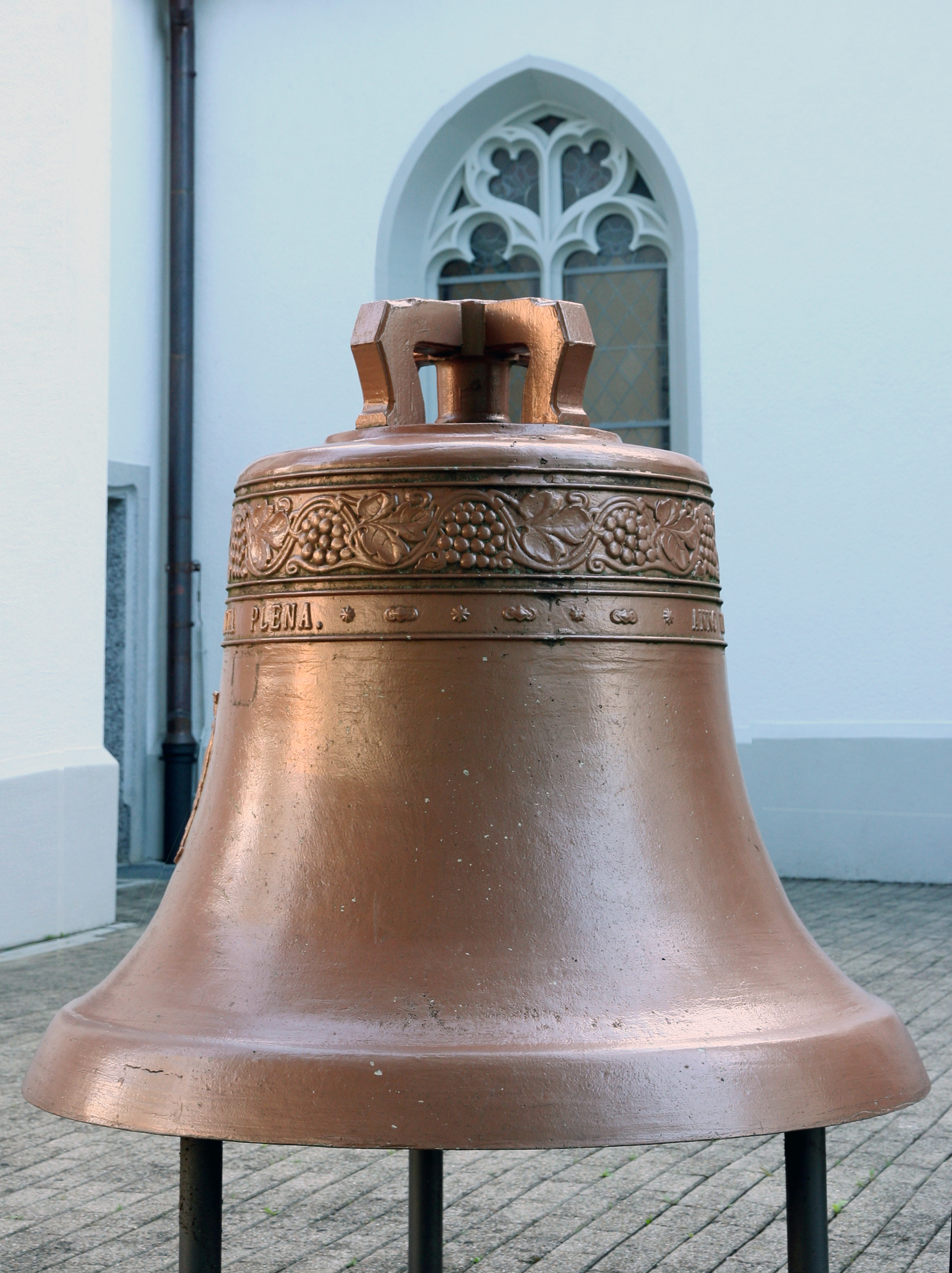 Römisch-katholische Pfarrkirche Hl. Dreifaltigkeit Adliswil, Glocke von 1928